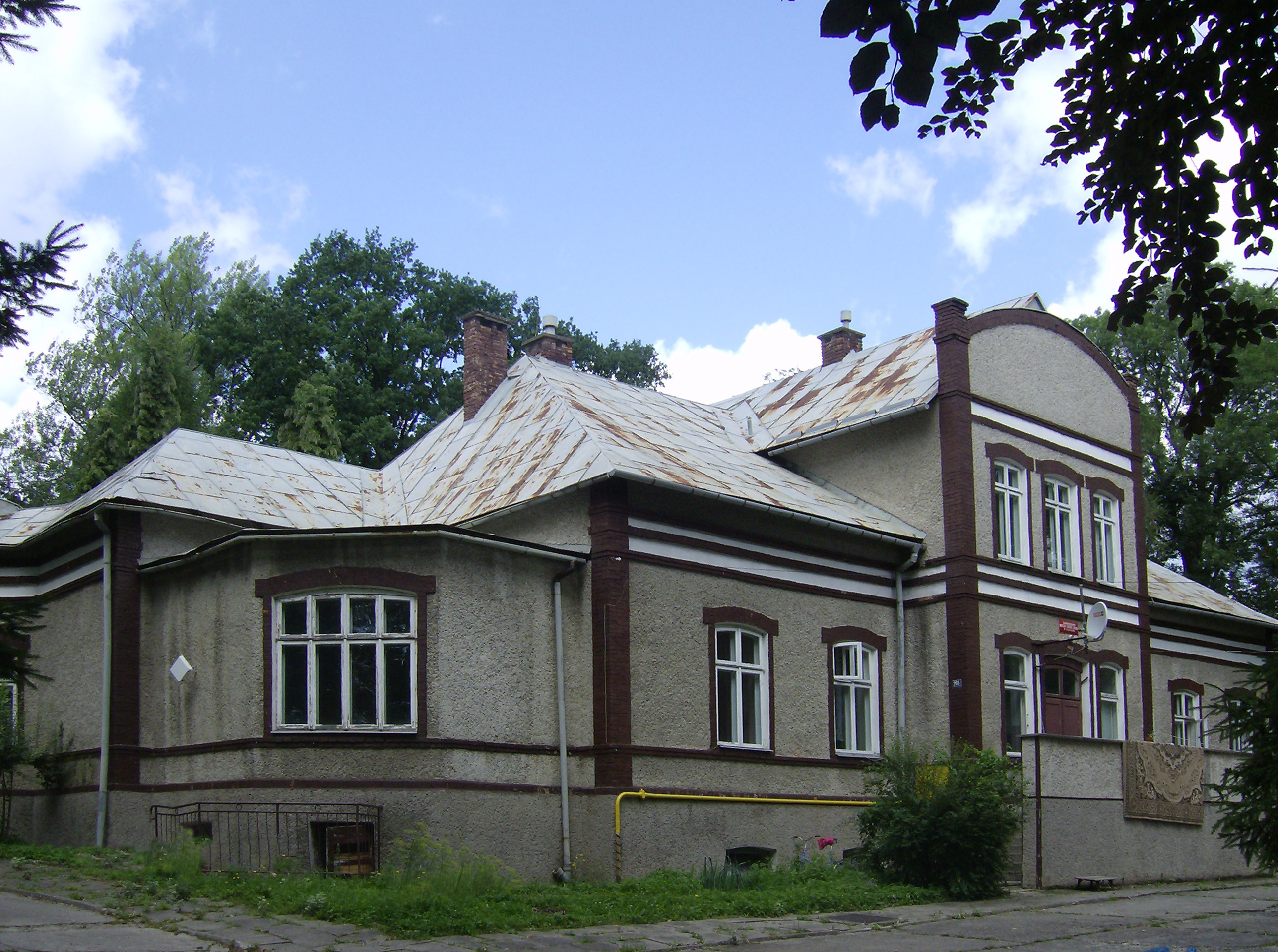 Dwór z początków XX w. w Jasionowie, obecnie Samorządowy Wiejski Ośrodek Zdrowia